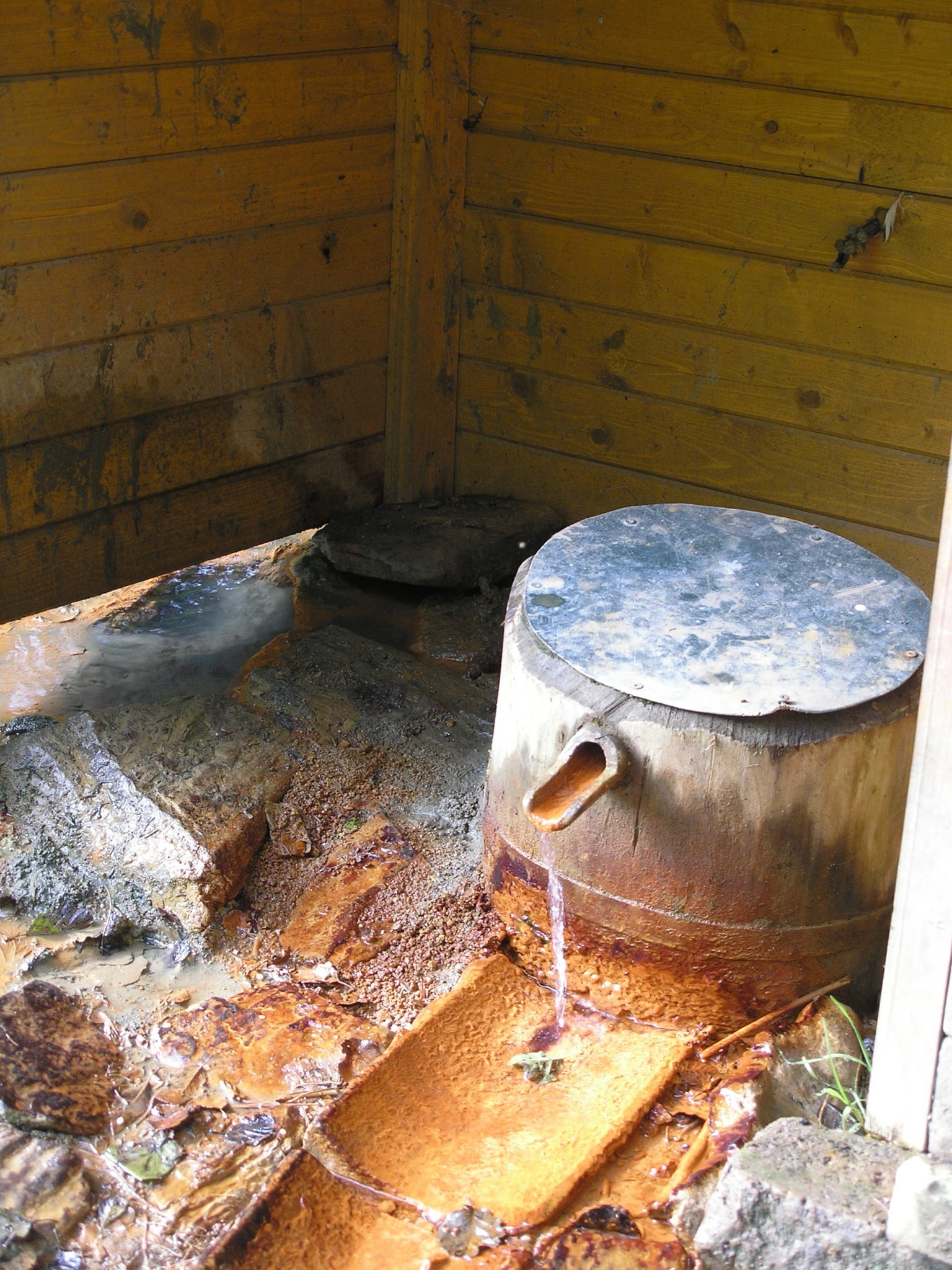 Pramen Čiperka